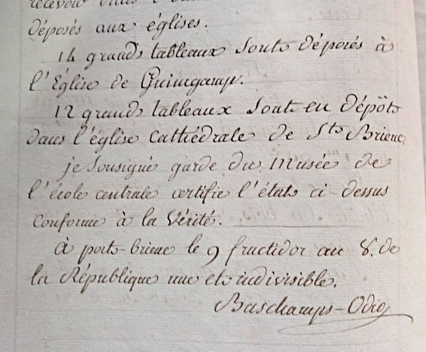 Signature de Odio-Baschamps et premier inventaire du musée d'art et d'histoire de Saint-Brieuc